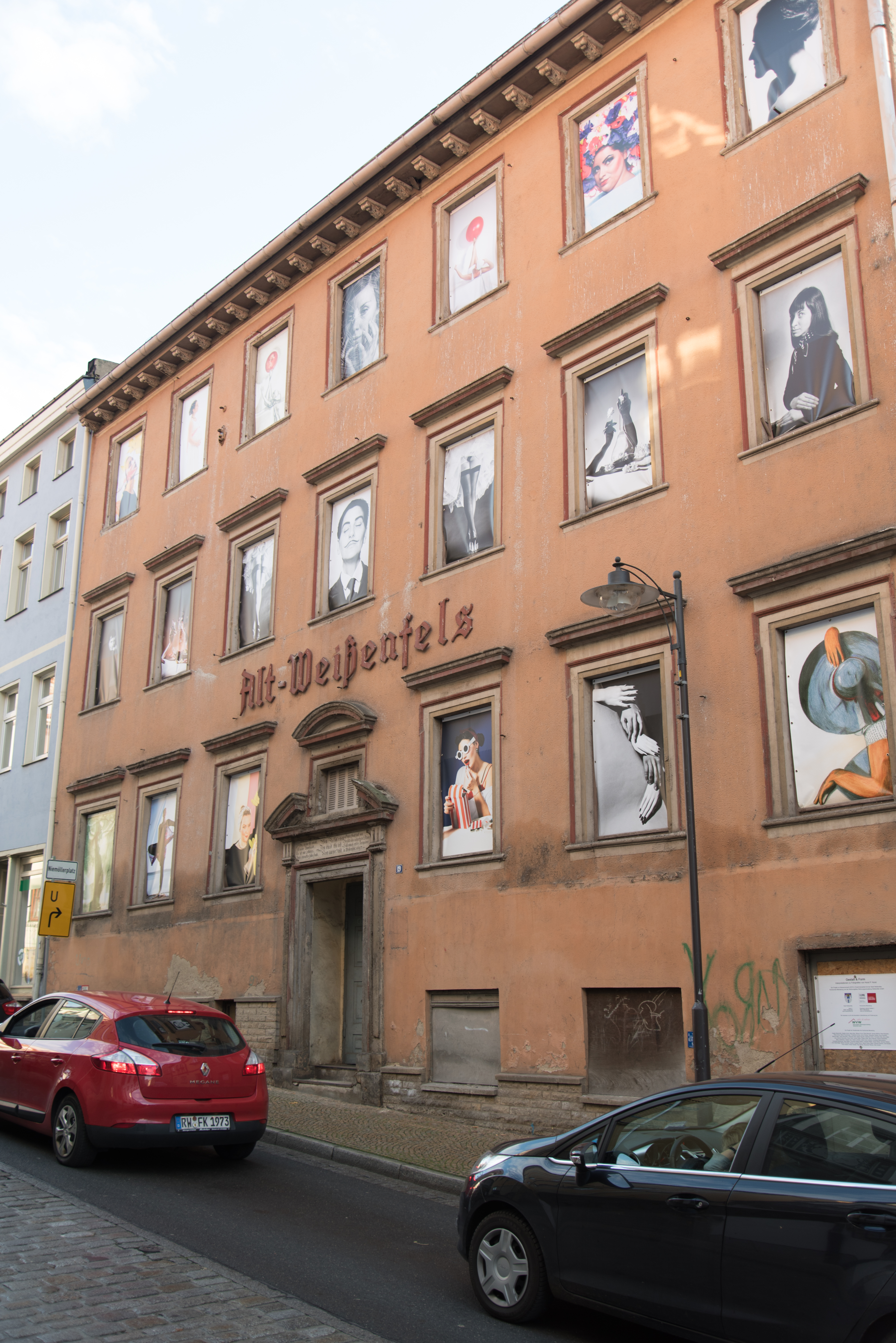 Weißenfels, Große Burgstraße 19